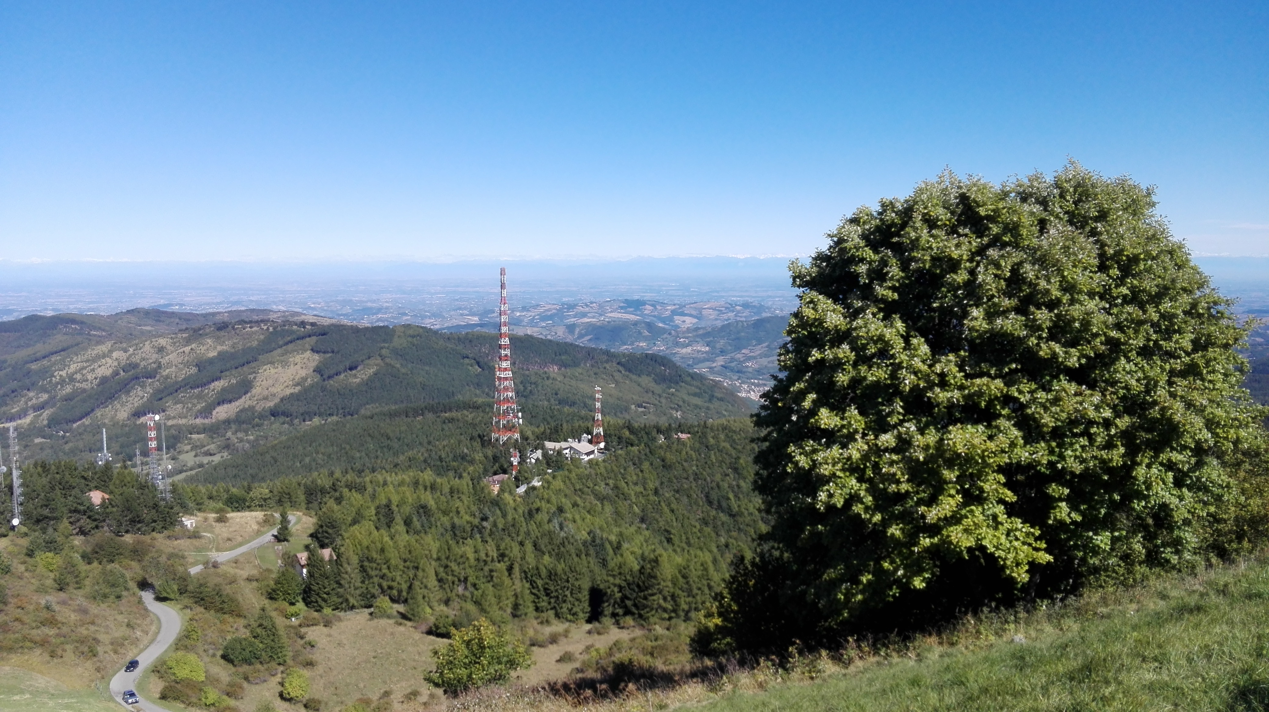 Trasmettitore Raiway Monte Penice